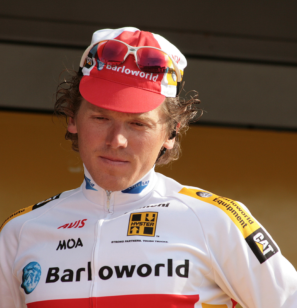 Christian Pfannberger bij de start van Luik-Bastenaken-Luik 2008